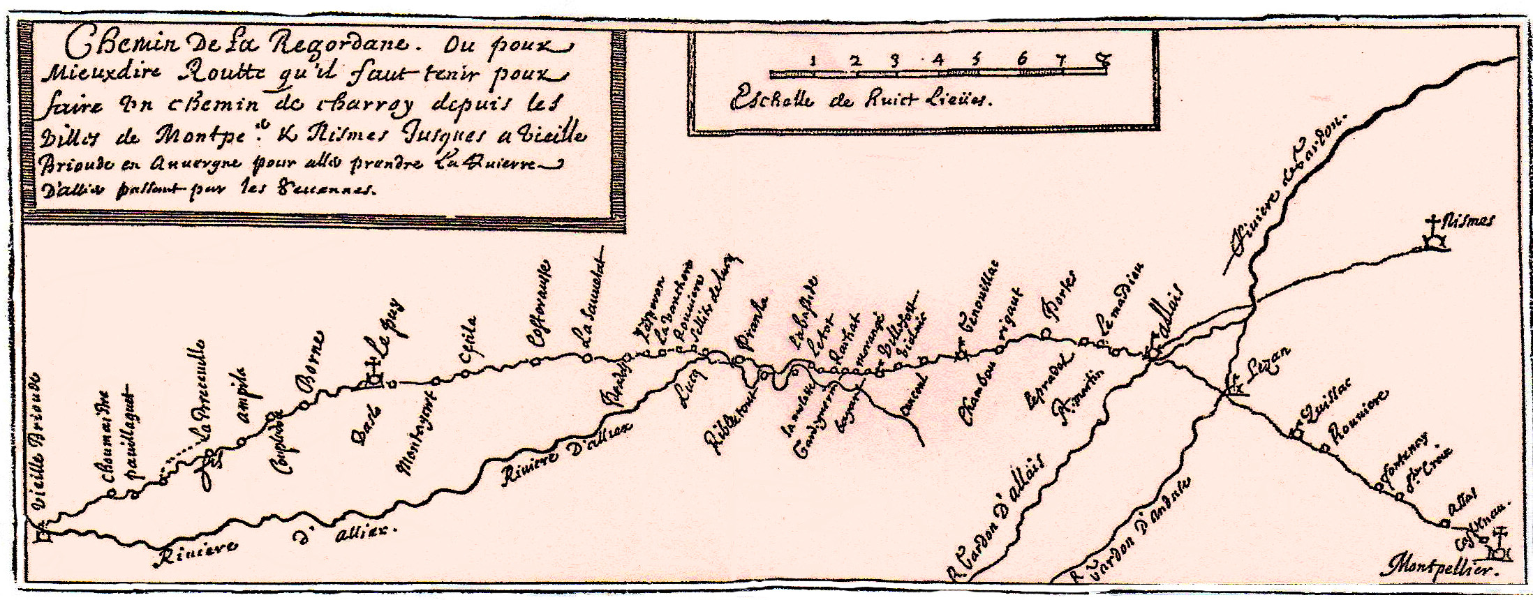 Itinéraire du chemin de Regordane dessiné en 1668